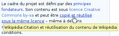 Infobulle affichée par un navigateur sur la page d'accueil de Wikipédia en français.